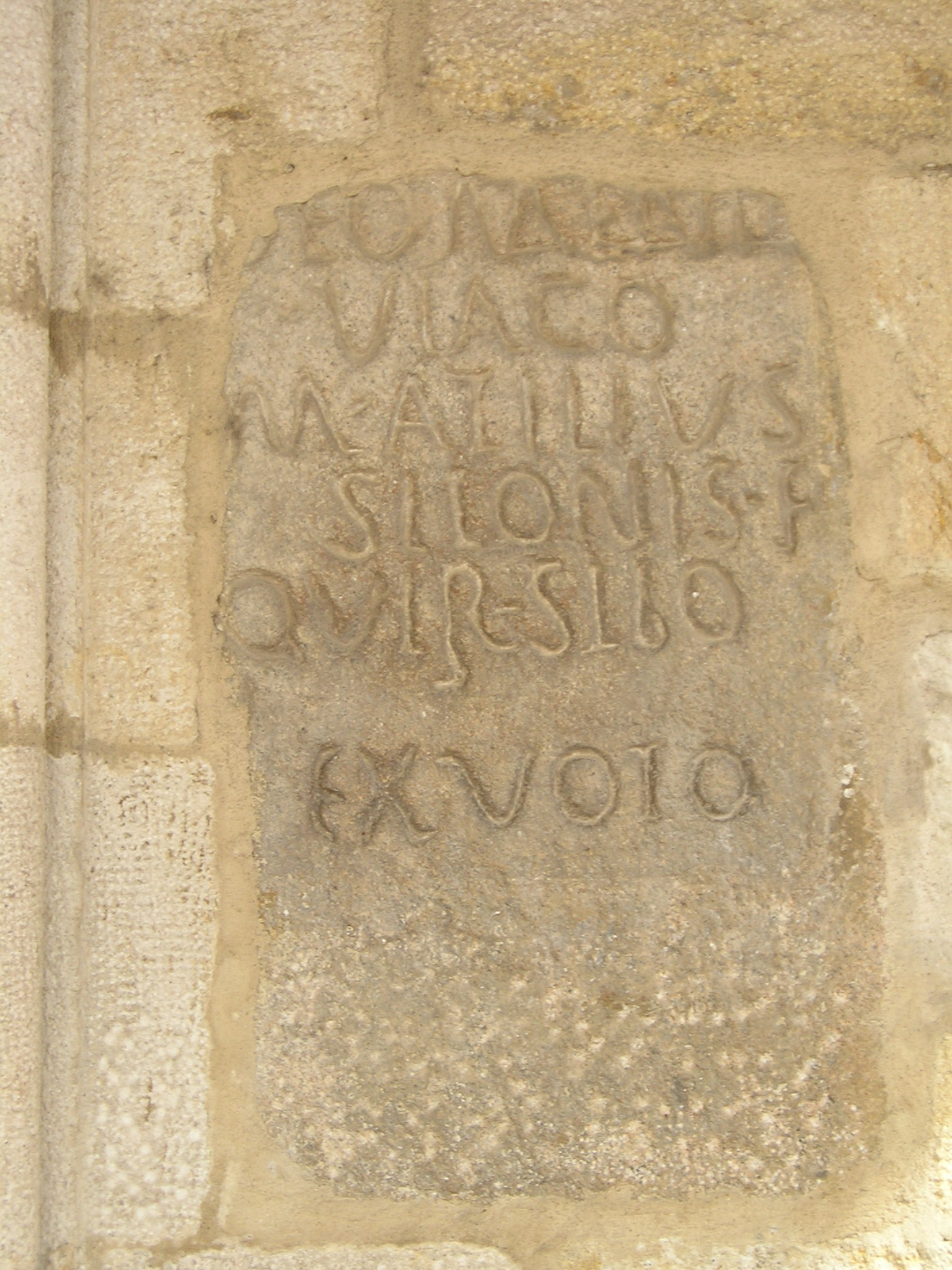 Ara votiva romana empotrada en la fachada del Ayuntamiento viejo de Zamora (España), de procedencia desconocida, correspondiente con la inscricpción CIL II 2628 = CIL II 5649, cuyo texto dice: DEO MENTO/VIACO/ M(arcus) ATILIVS/ SILONIS F(ilius)/ QVIR(ina) SILO/ EX VOTO